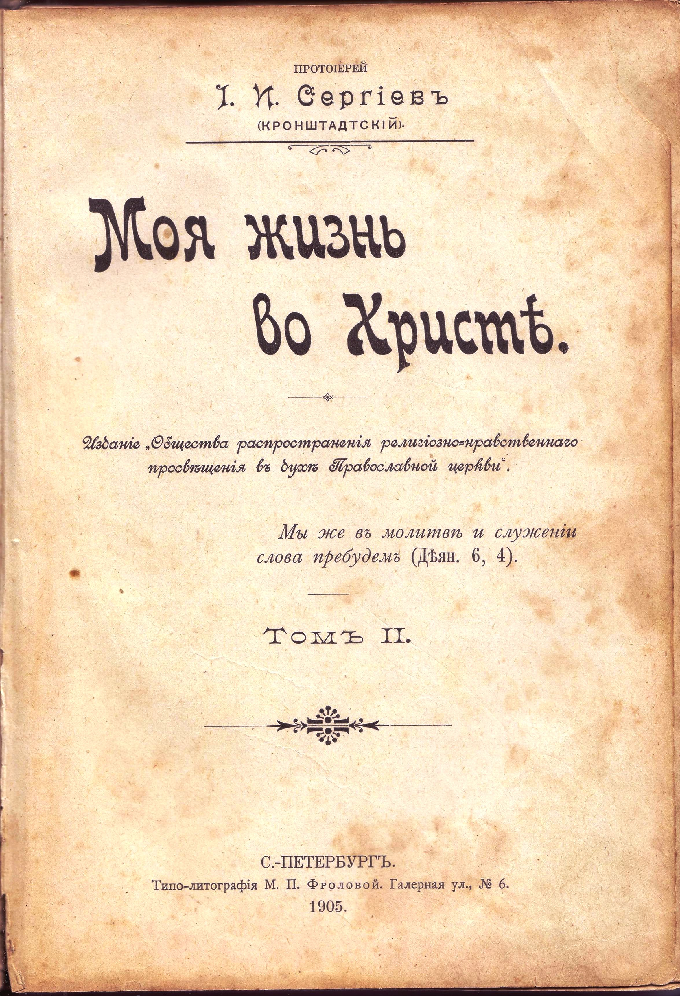 Книга «Моя жизнь во Христе» Иоанна Кронштадтского прижизненного издания 1905 года. Титульный лист второго тома.